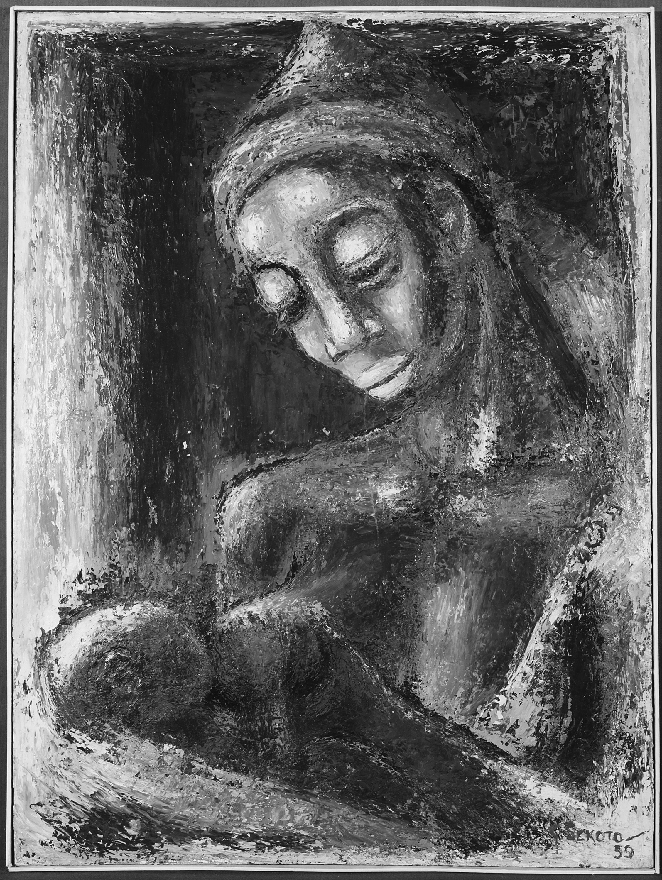 General notes: Oil